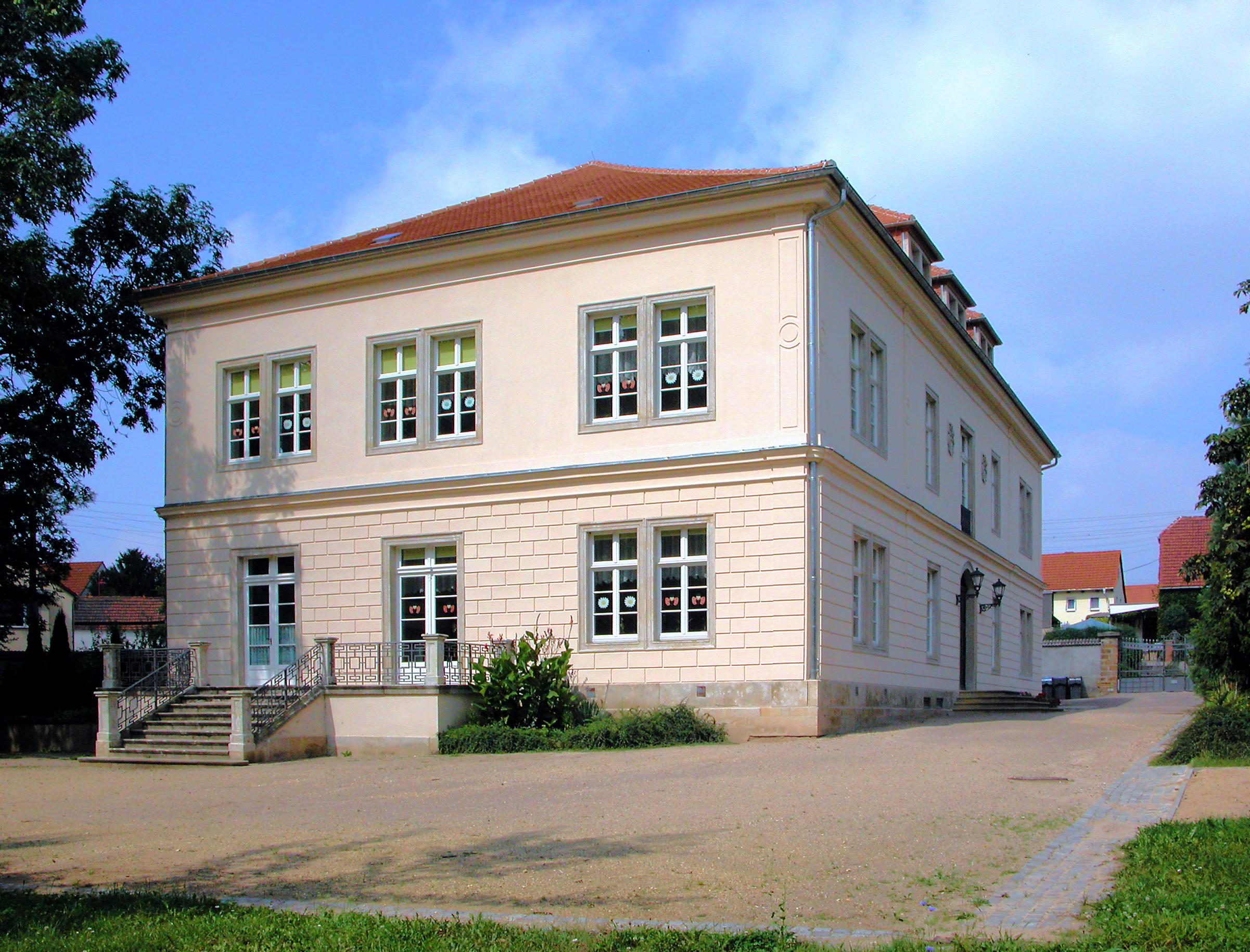 26.08.2007 01594 Ragewitz (Stauchitz): Schloß Stauchitz (1850/51), Südseite. Seit 1978 Schule, seit 2004 "Grundschule im Jahnatal". [DSCN29110.TIF]20070826520DR.JPG(c)Blobelt